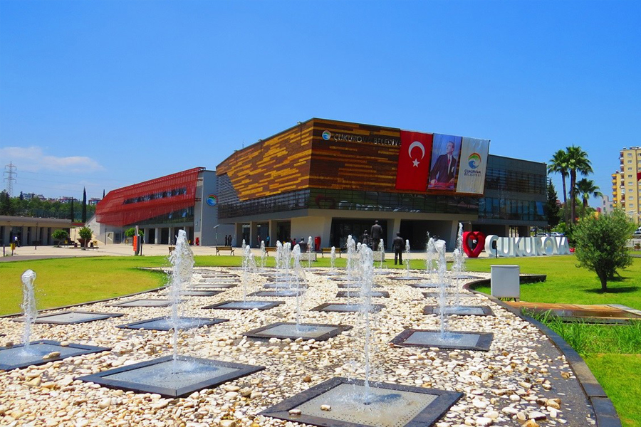 Çukurova belediye binası. (Fotoğraf: Ersin Çaldır)